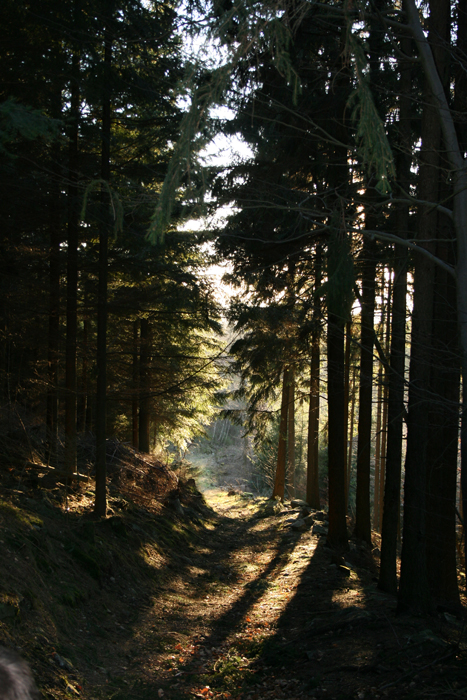 Lützelsoon Wald bei Bruschied (Rheinland-Pfalz)